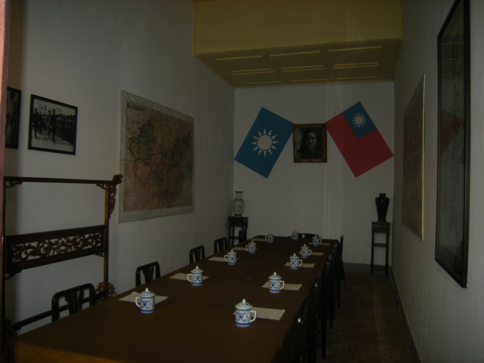 陝西臨潼華清池景區內的五間廳內展覽的當年西安事變時的五間廳。五間廳內的會議室。